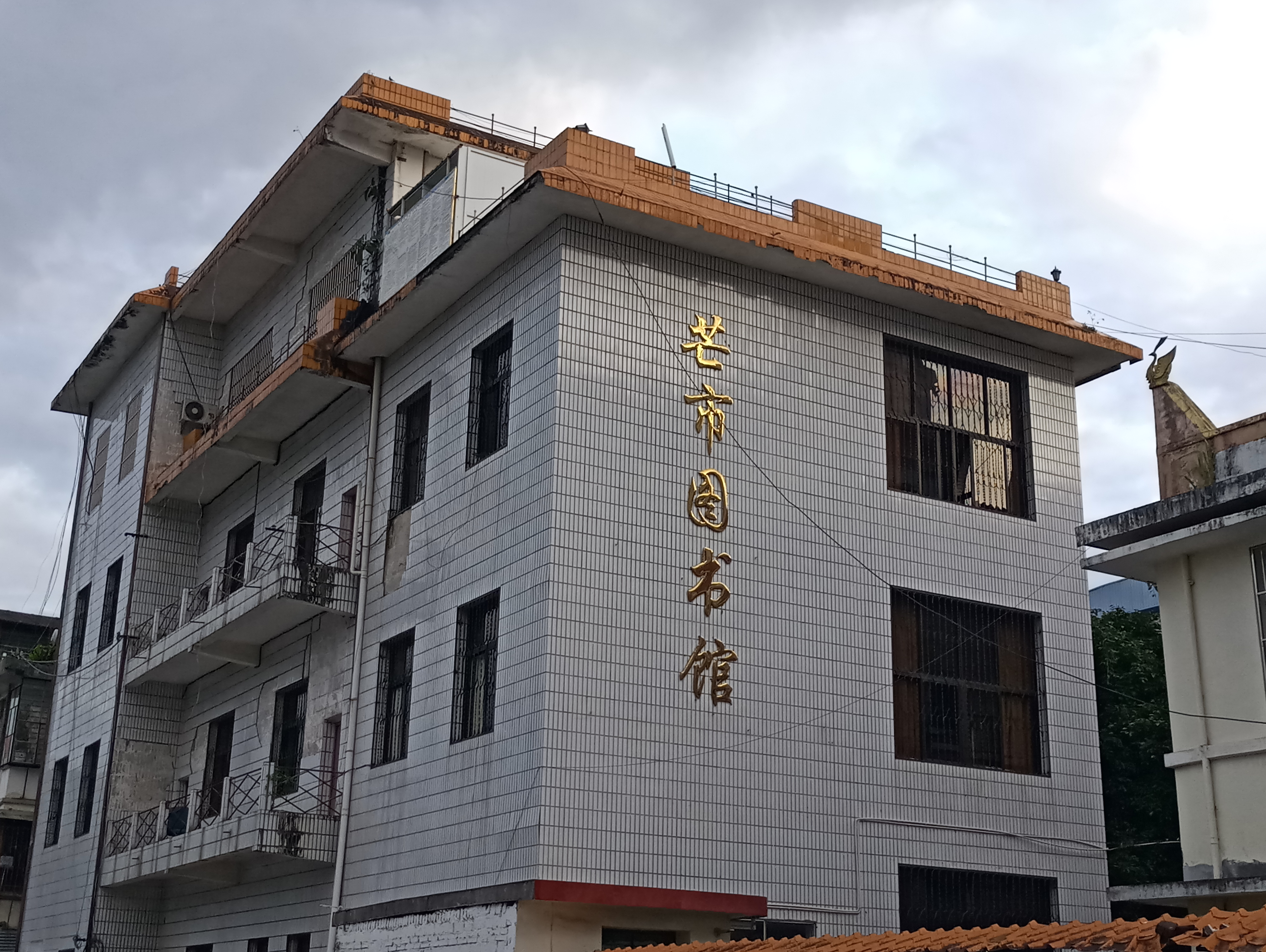 芒市图书馆